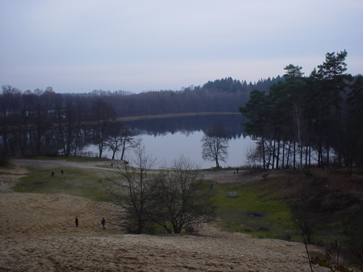 Jezioro Skanda w Olsztynie